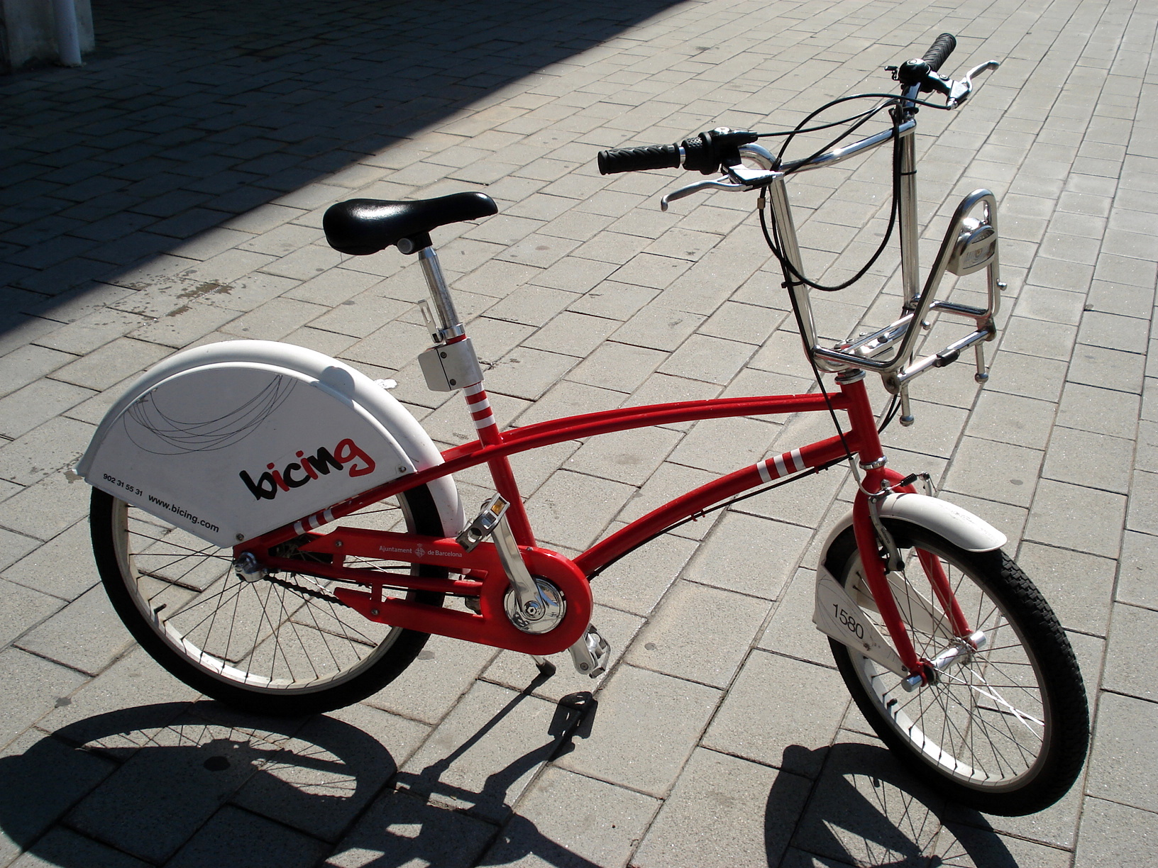 Foto de la bicileta Bicing de Barcelona